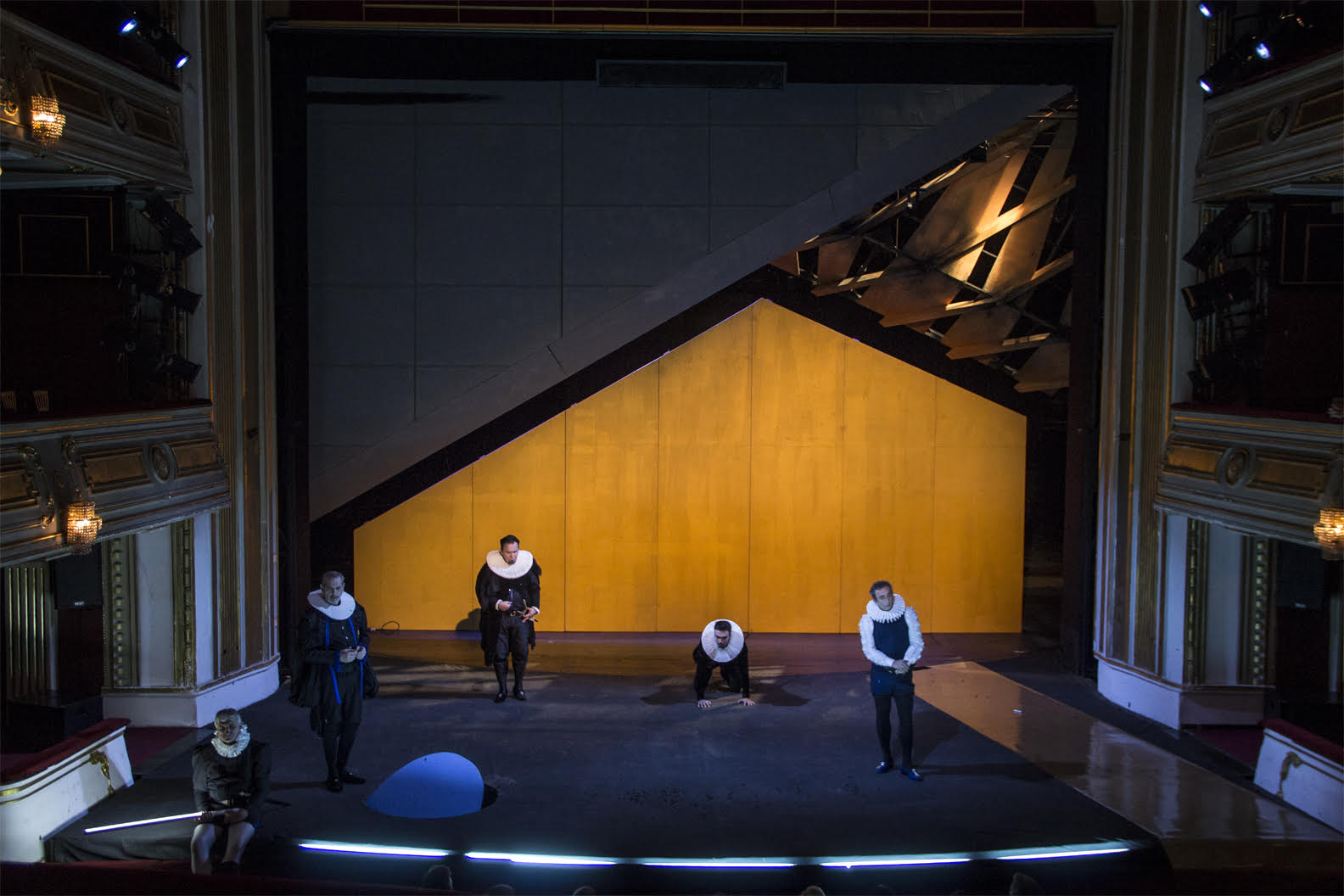 Snimak scenografije pozorišne predstave Marija Stjuart-Narodno pozorište u Beogradu, 2015. Autor:Jasmina Holbus